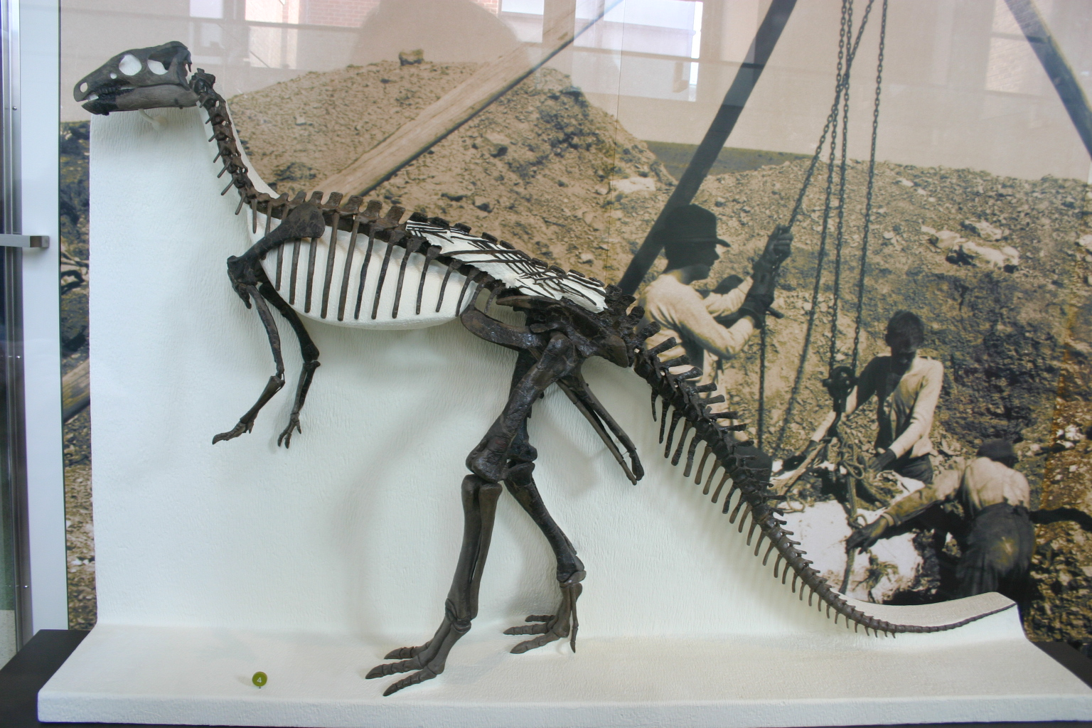 flexible reptile, AMNH 6120 Visit my blog at